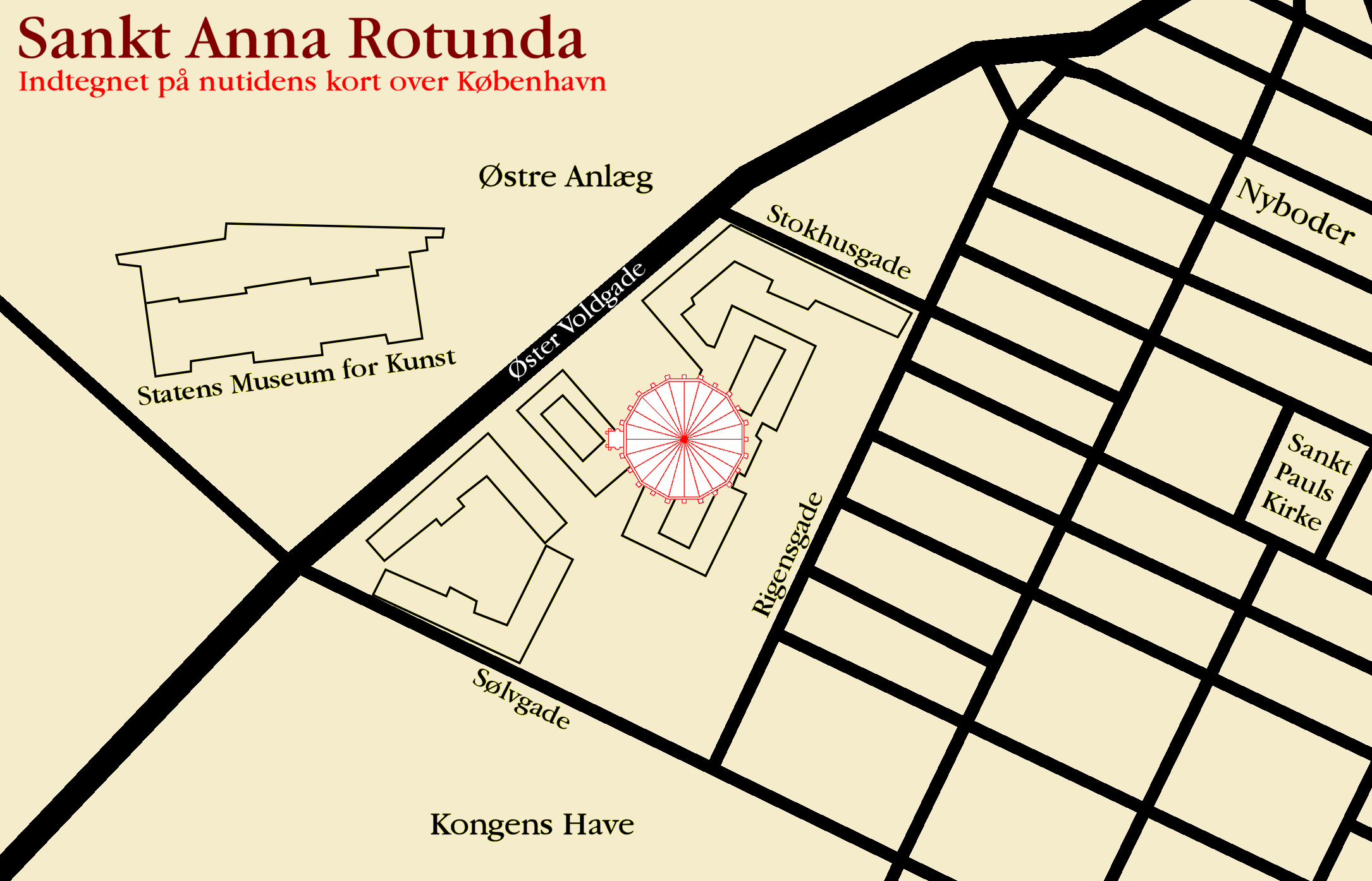 Sankt Anna Rotunda, Copenhagen, Denmark Sankt Anna Rotunda overlayed on modern map of Copenhagen.